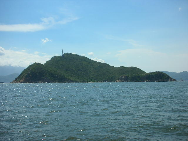 中文（香港）: 大交椅洲。